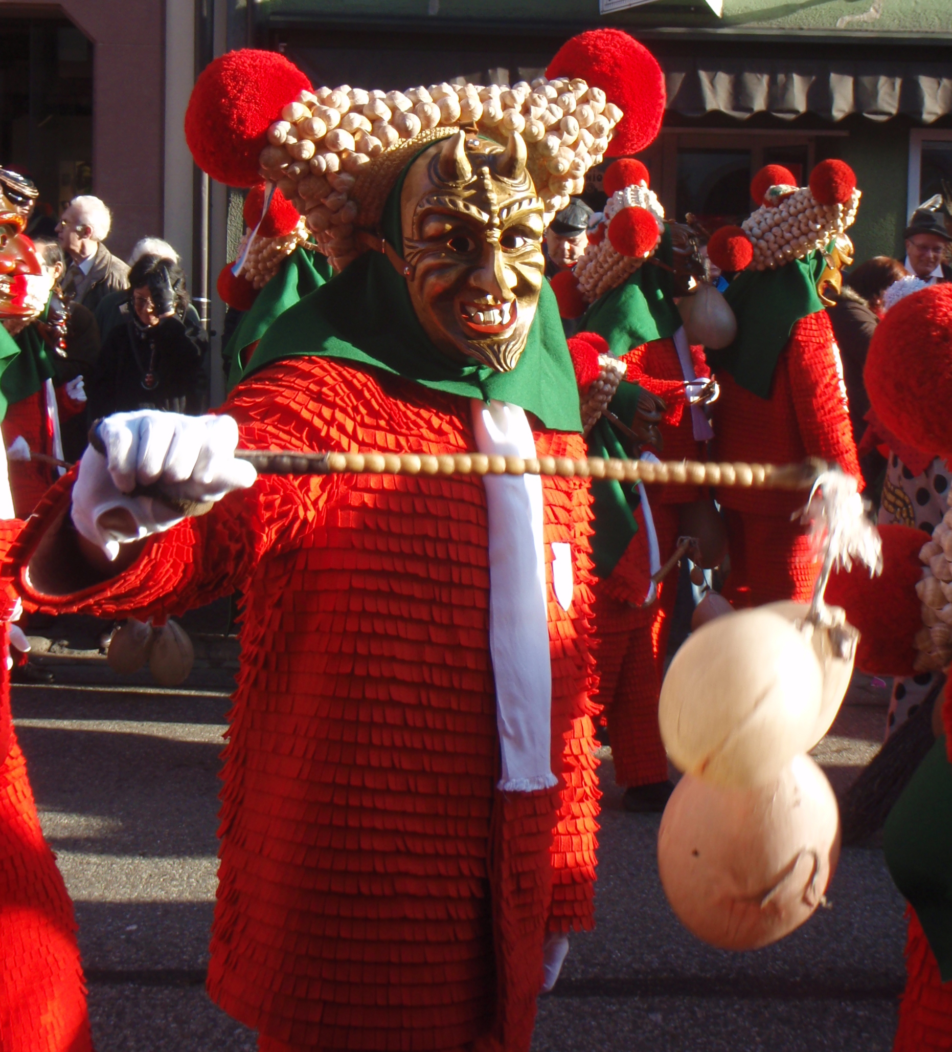 Großer Schuttigumzug in Elzach, in der Nähe von Freiburg i. Br.